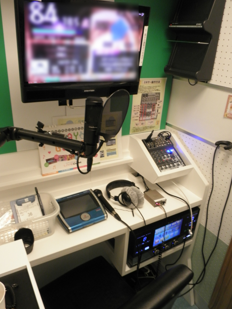 コシダカホールディングスが運営する一人カラオケ専門店、「ワンカラ」（新宿大ガード店）の部屋の一例。